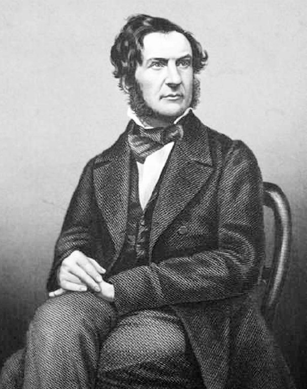 William Ewart Gladstone (* 29. Dezember 1809 in Liverpool; † 19. Mai 1898 in Hawarden/Wales, seinem Landsitz) war mehrfach britischer Premierminister